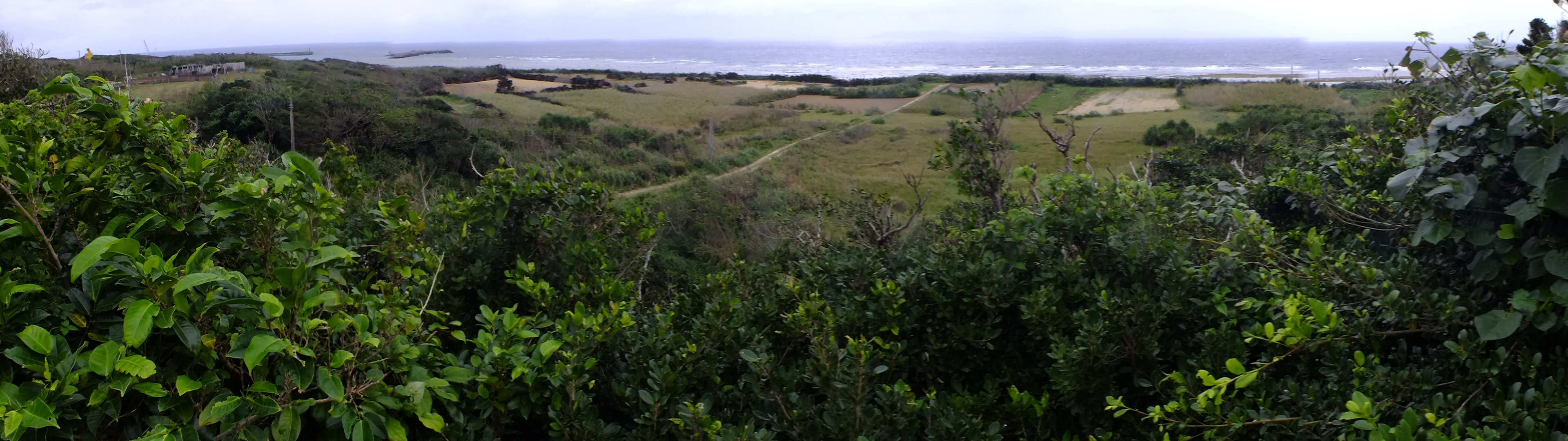 Shimotabaru-jou,Hateruma 下田原城・ぶりぶち公園 波照間島